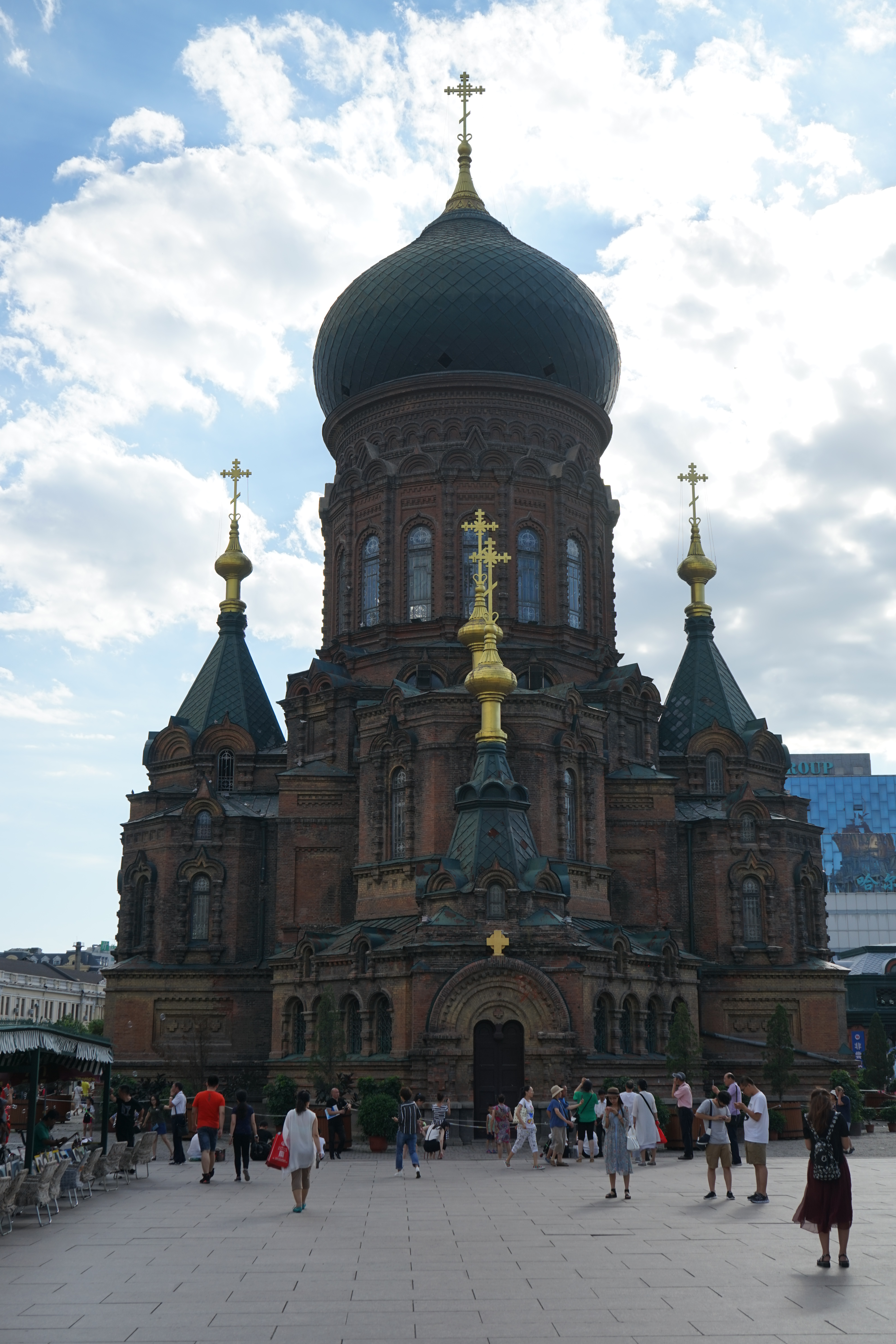 圣索菲亚教堂正面